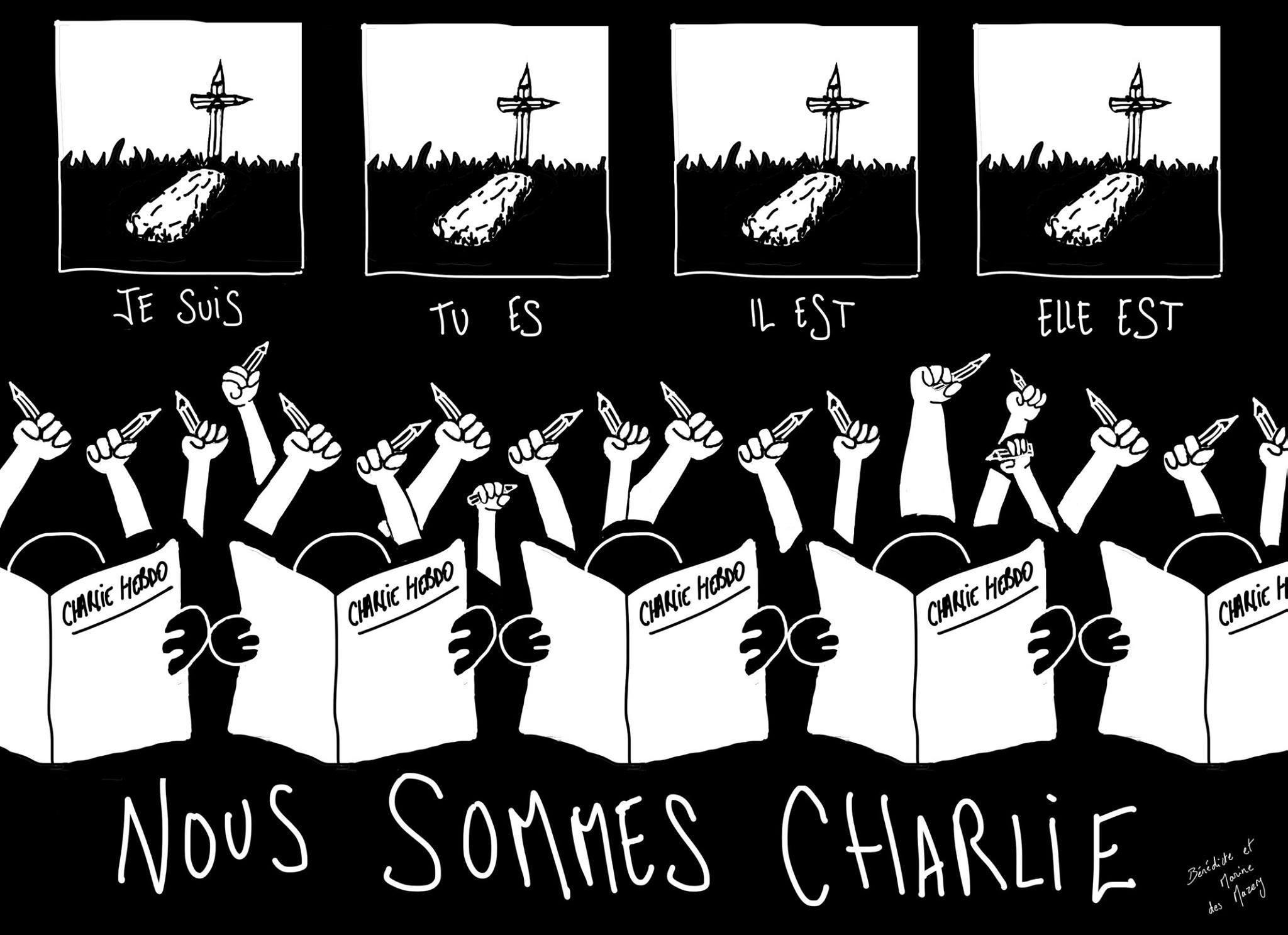 Nous sommes Charlie, par Marine des Mazery - Les étudiants du CESAN rendent hommage